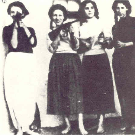 Les poseuses de bombes pendant la Guerre d'Algérie. De gauche à droite: Samia Lakhdari, Zohra Drif, Djamila Bouhired et Hassiba Ben Bouali